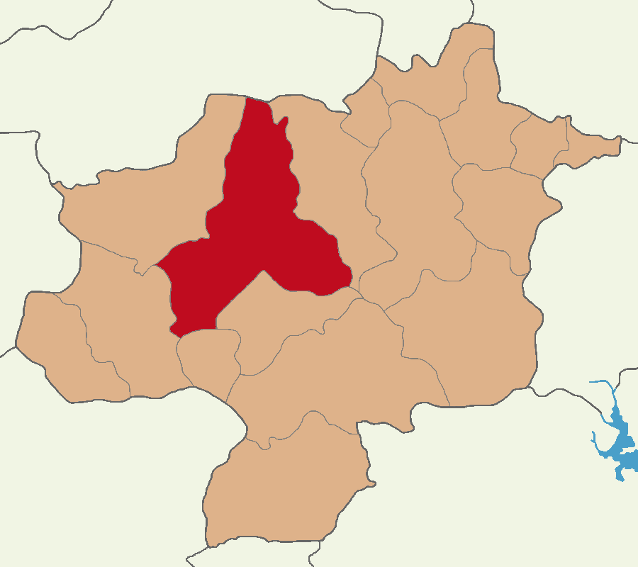 Sivas Merkez ilçesinin konumu